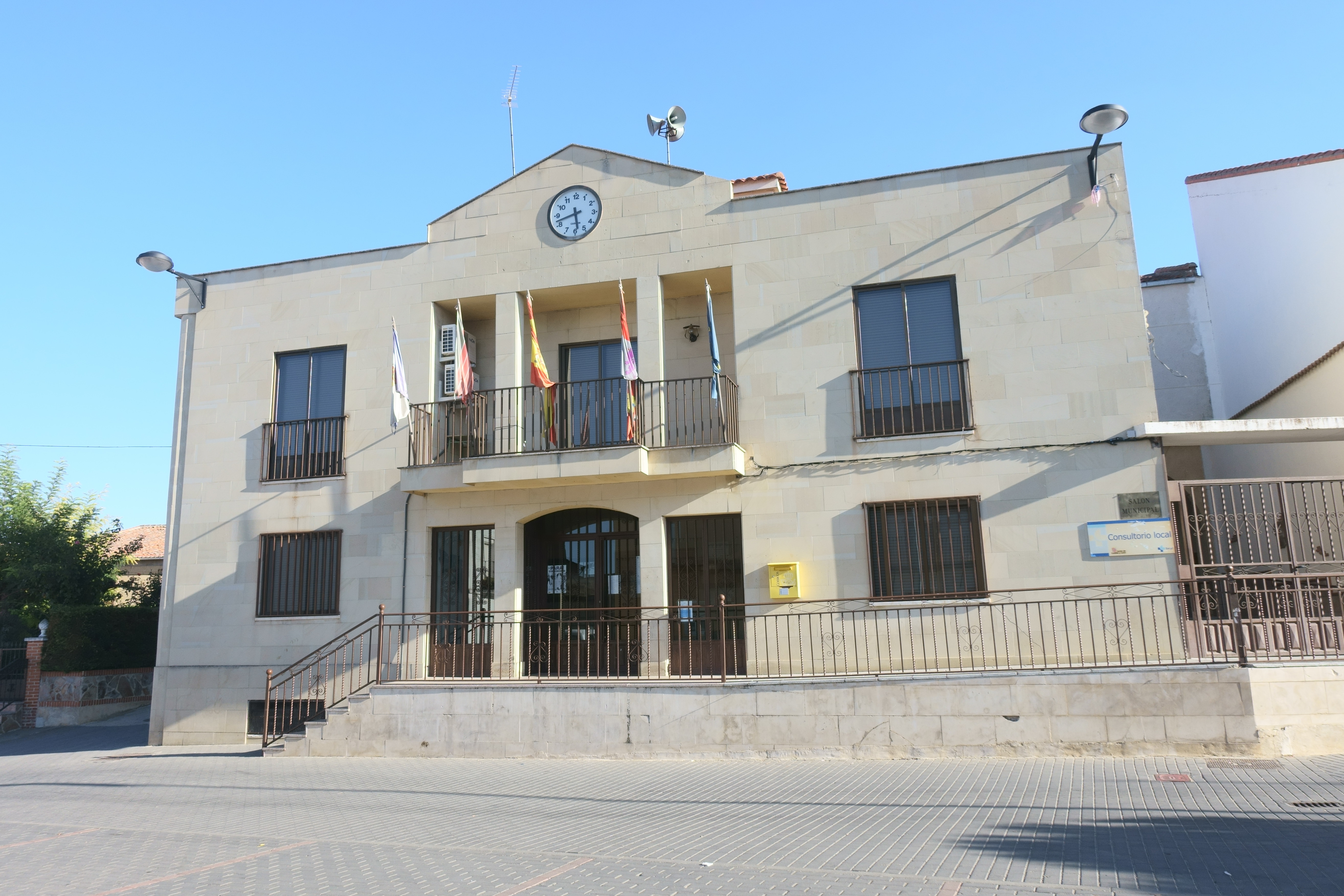 Casa consistorial de La Bóveda de Toro (Zamora, España).